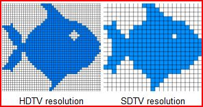 השוואת שיטות שידור HD לרגיל